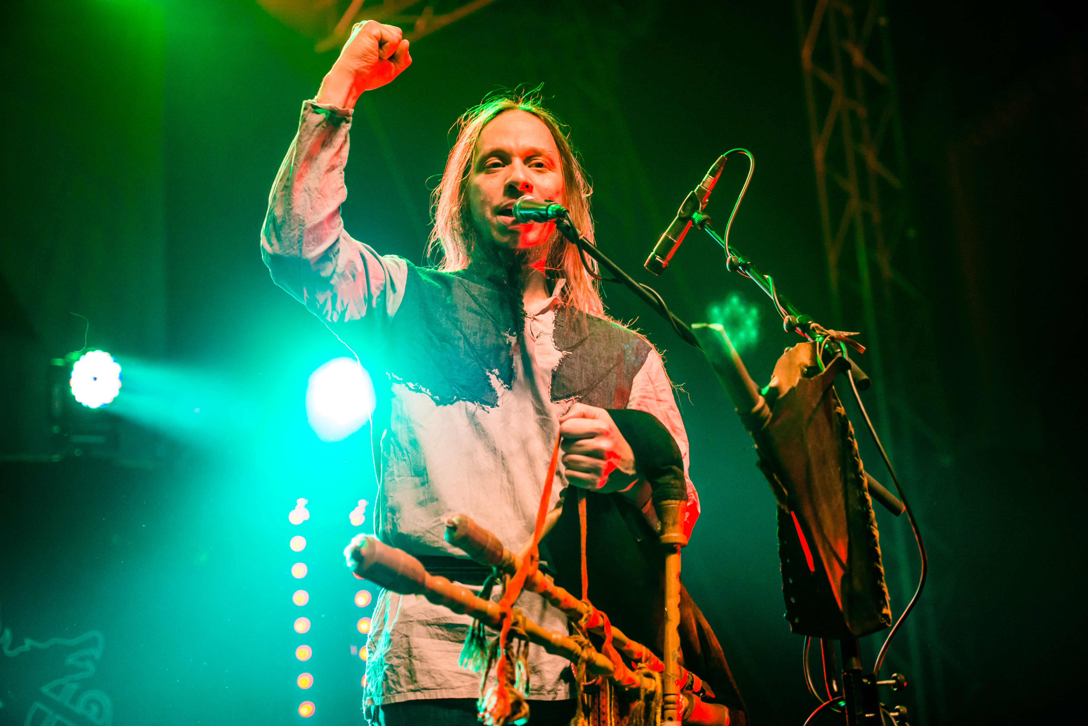 'Metsatöll - Ruhrpott Metal Meeting 2015 - Oberhausen'